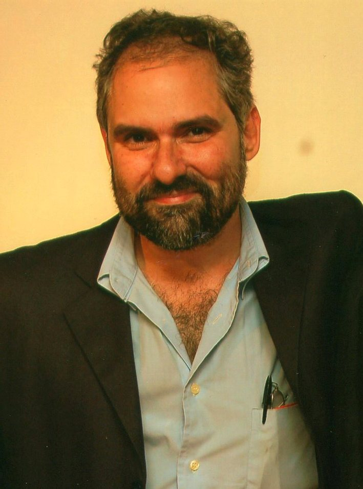 Alexei Bueno, poeta, editor e ensaísta brasileiro.